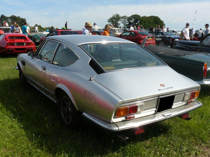 montlhery 2012